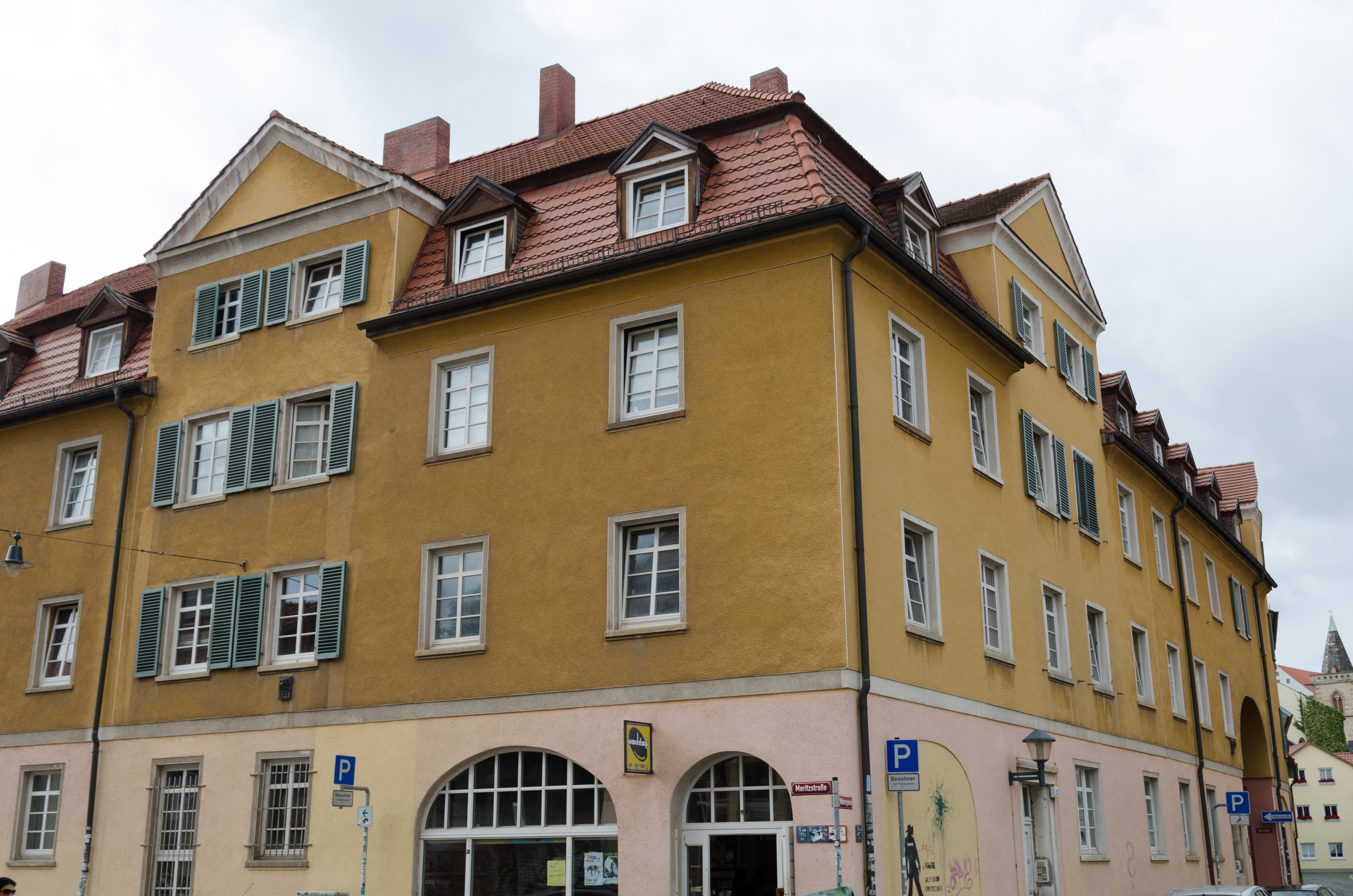 Eckhaus Moritzhof (Webergasse/Moritzstraße) - Webergasse 25, Erfurt